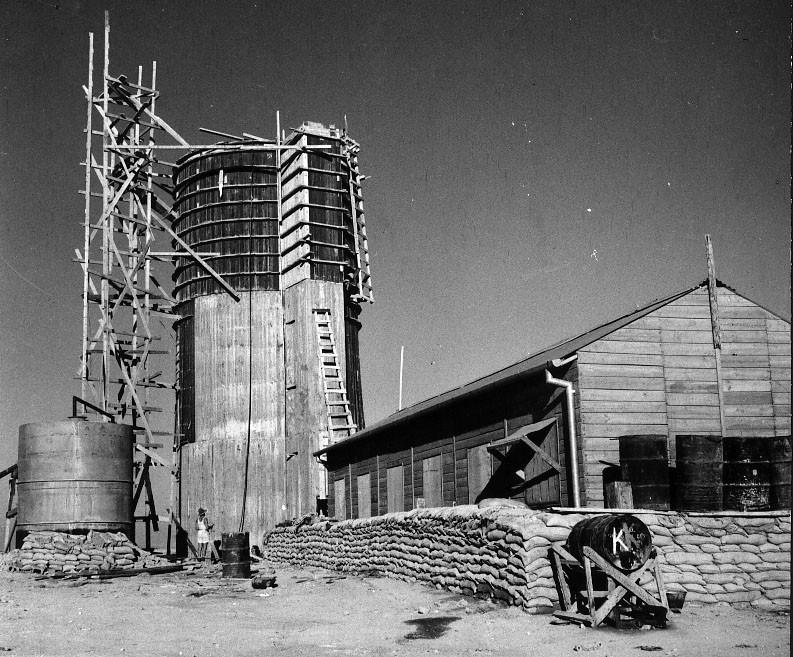 חטיבת הנגב - 2 - הישובים בהתבצרות ובלחימה - קיבוץ שובל - בניית מגדל המים ליד חדר האוכל